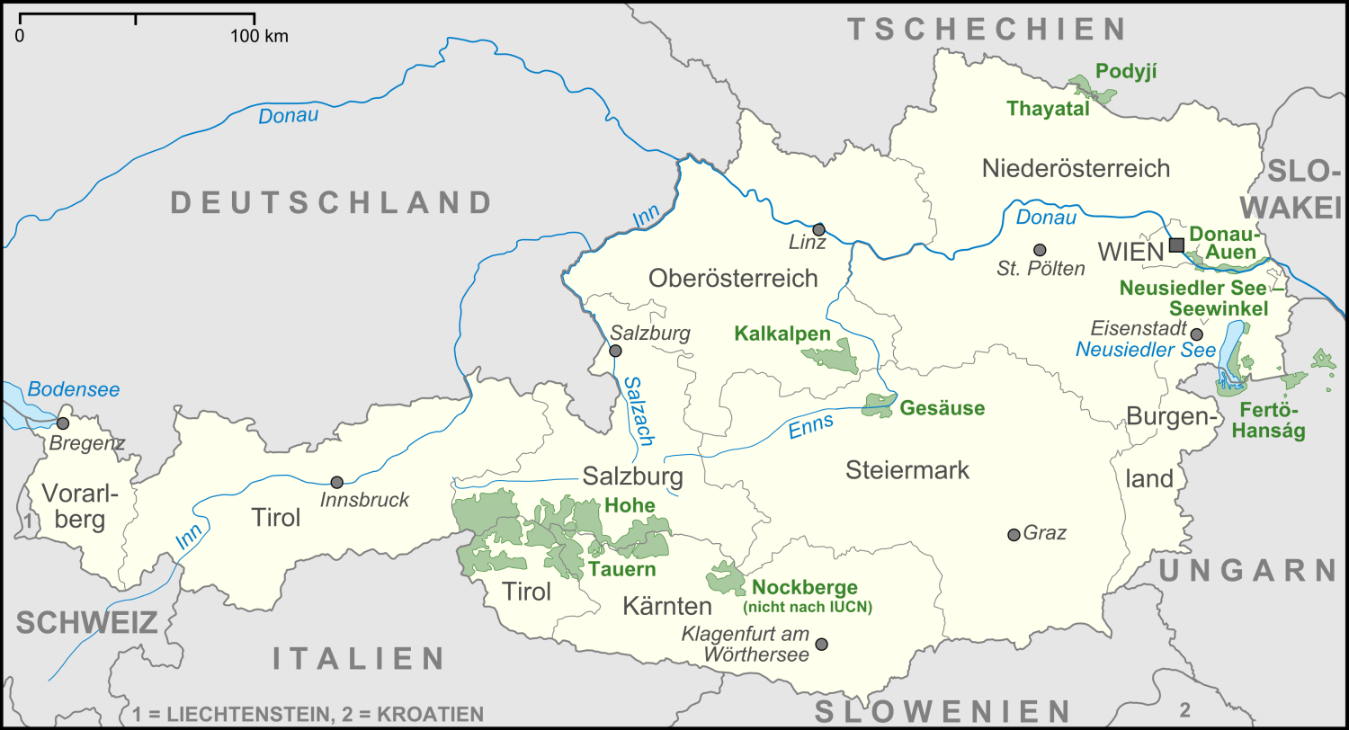 Karte der Nationalparks/Nationalparke in Österreich